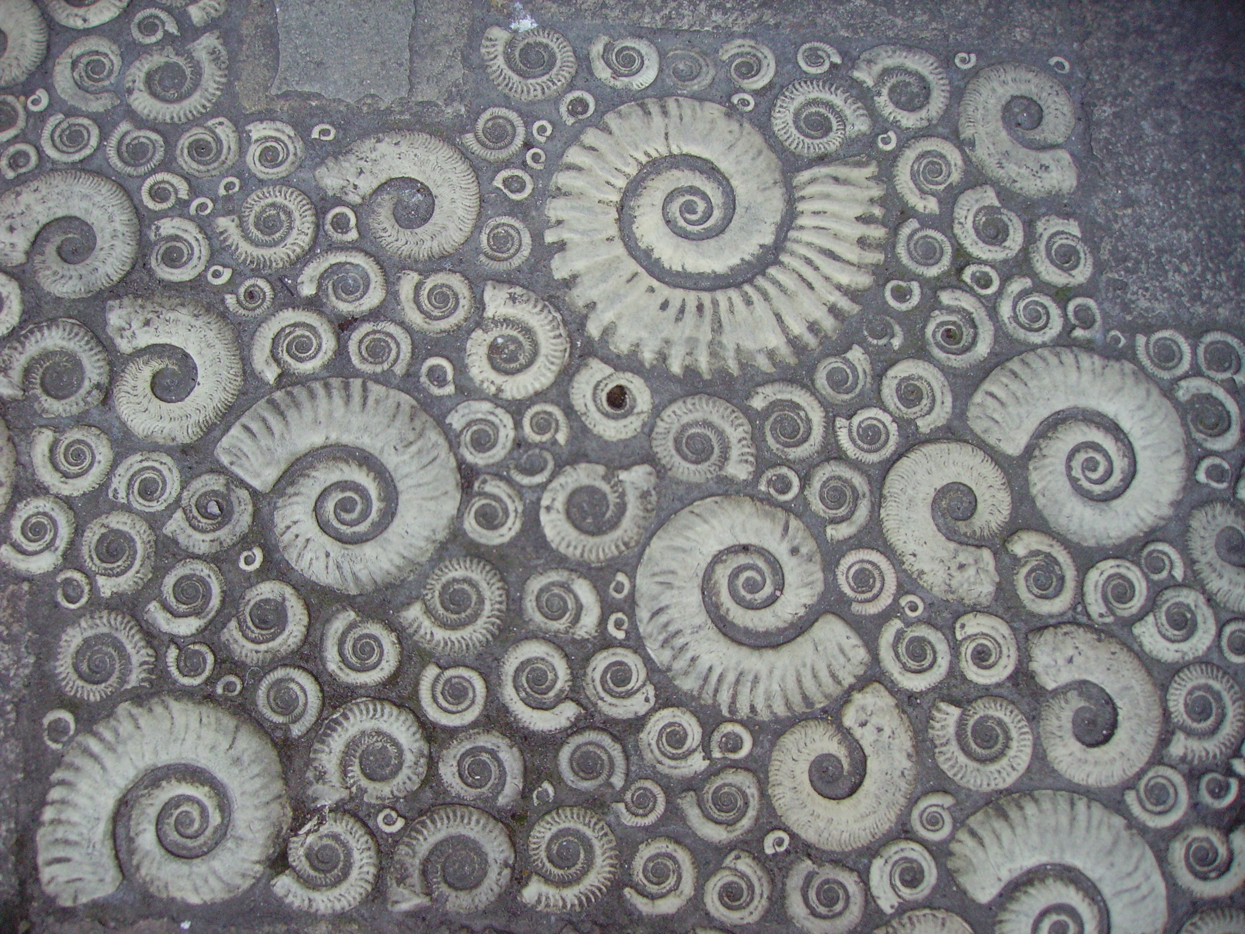 Coade stone ammonites